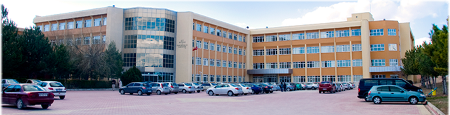 IIBF UI